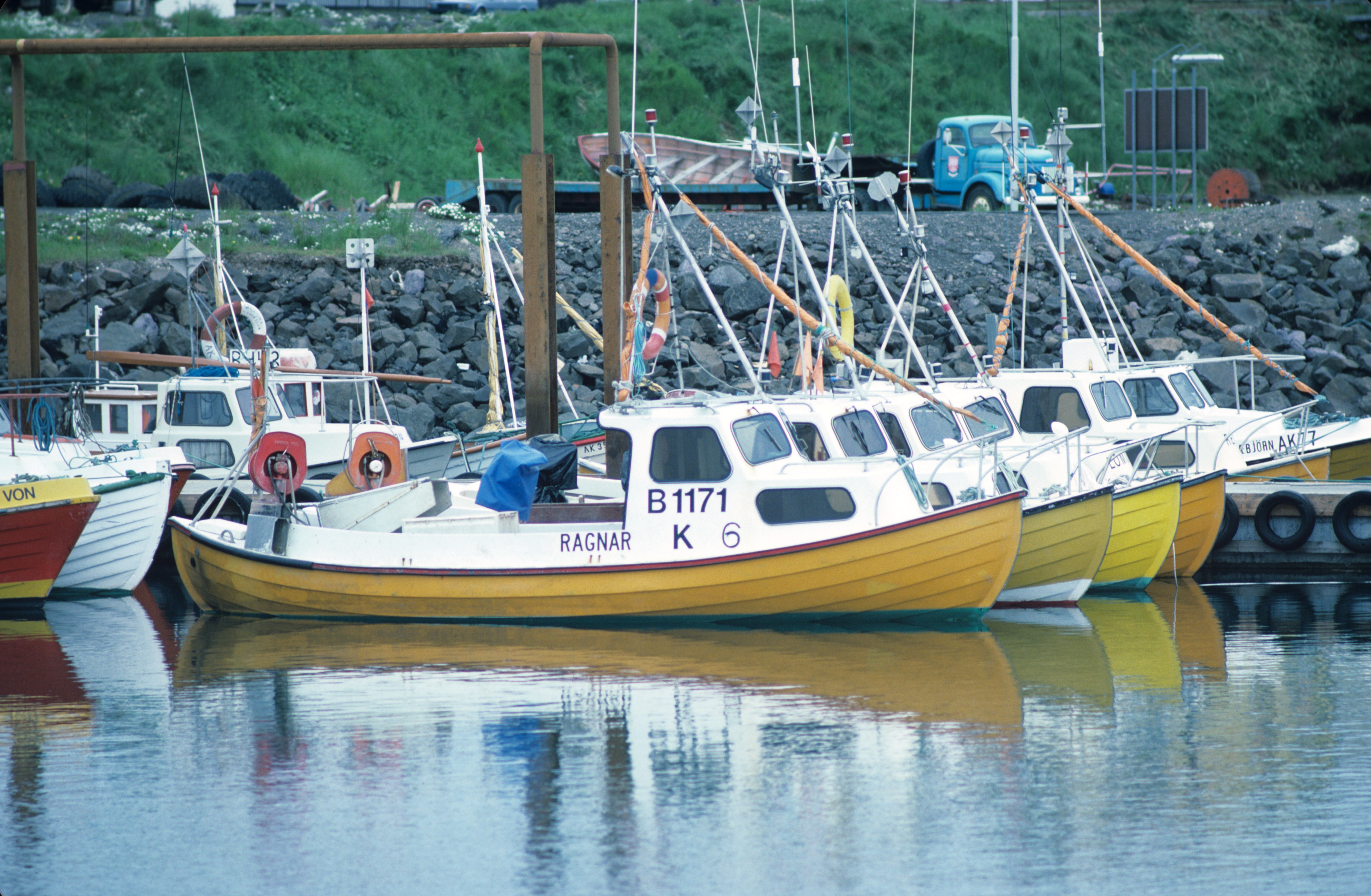 Dans le port d'Akranes, un ensemble de petits bateaux de pêche (des ligneurs) du même type. On peut remarquer que la coque a un bordage à clins (ou imitation clins s'il est en plastique). D'autre part, la forme de la coque n'est pas sans rappeler celle du drakkar. Akranes, Vesturland, Ísland.